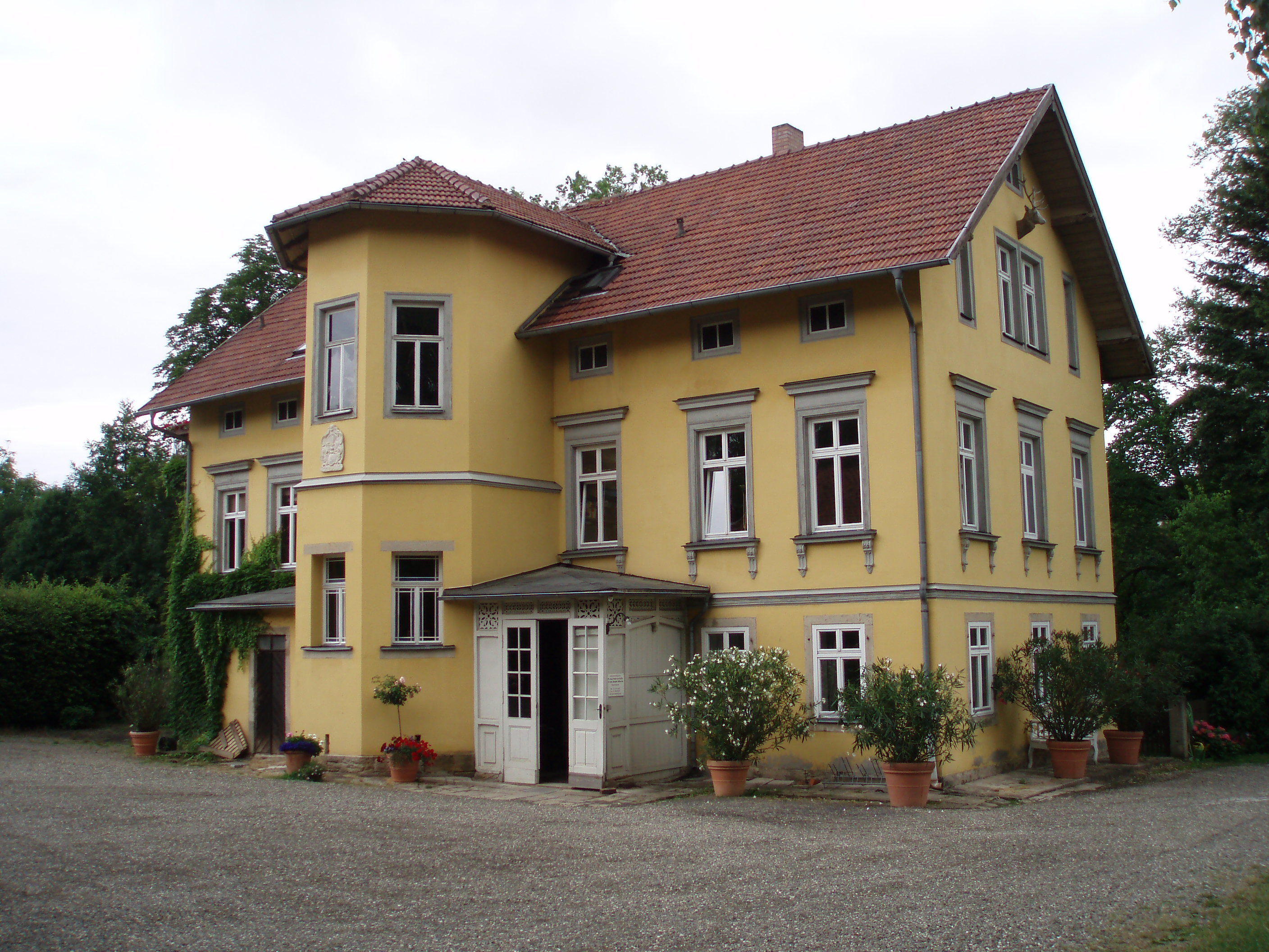 Coburg-Wüstenahorn, Am Mühlteich 2: Ehemaliges Rittergut